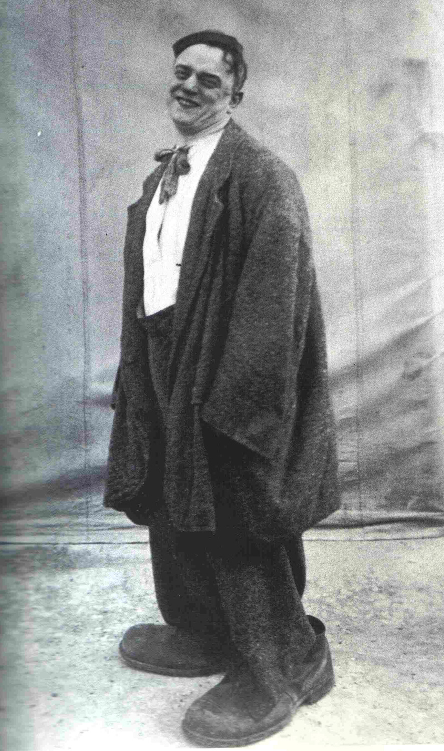 Giacomino in abiti di scena